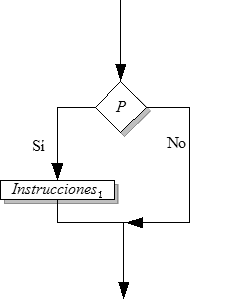 Diagrama de flujo que ejemplifica la instrucción condicional simple